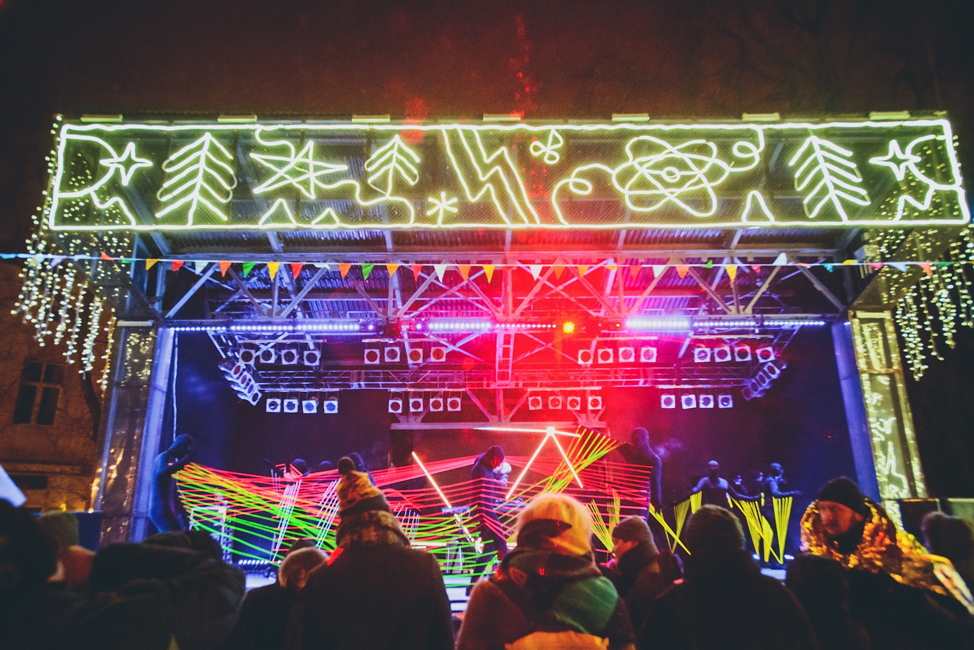 Новый год 2016